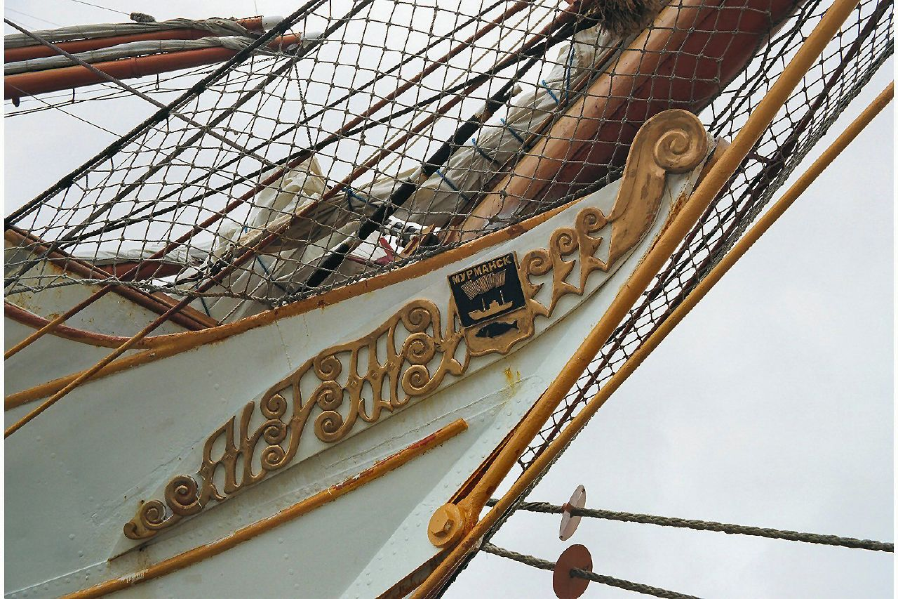 Герб Мурманска на носу барка Седов